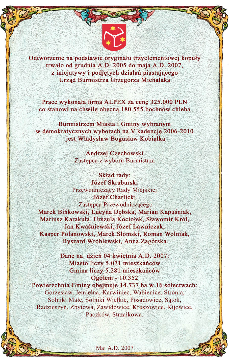 Dokument z kuli kopuły wieży zamkowej w Bierutowie